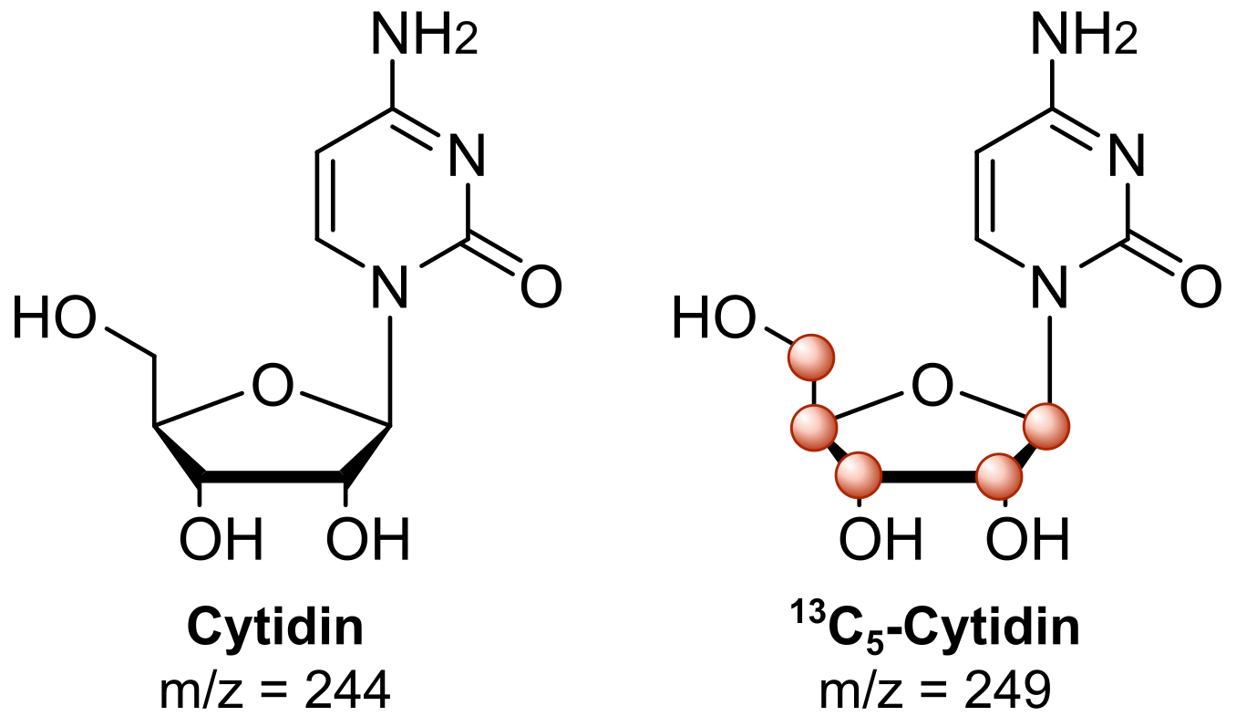 Labeling of cytidine. Left: unlabeled cytidine, right: ribose-labeled cytidine (red dots = 13C).